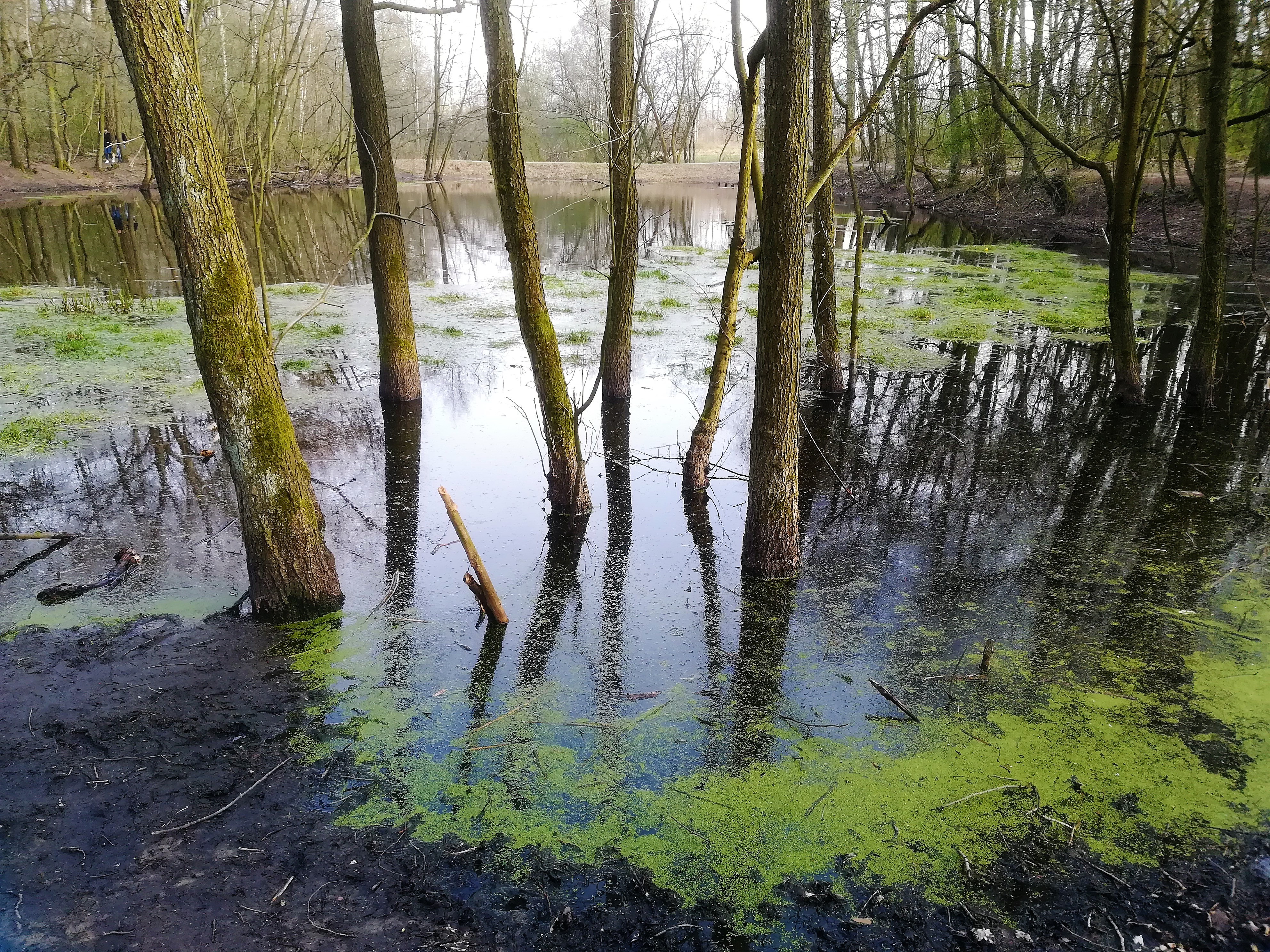 Rezerwat Żurawiniec w Poznaniu w 2018, po podniesieniu poziomu wód.